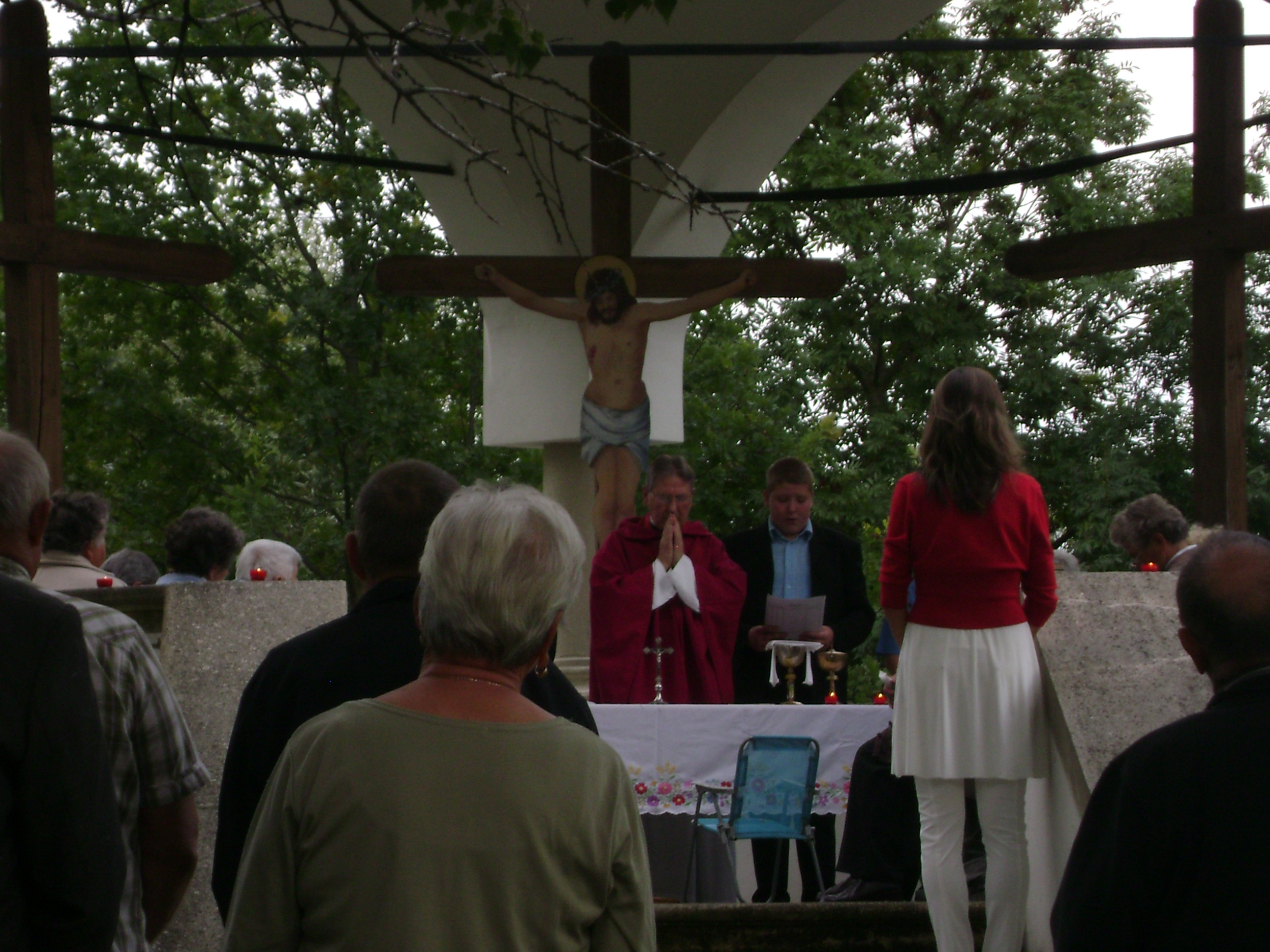 Szent Kereszt felmagasztalása ünnepén mise az ásványrárói kálváriánál.